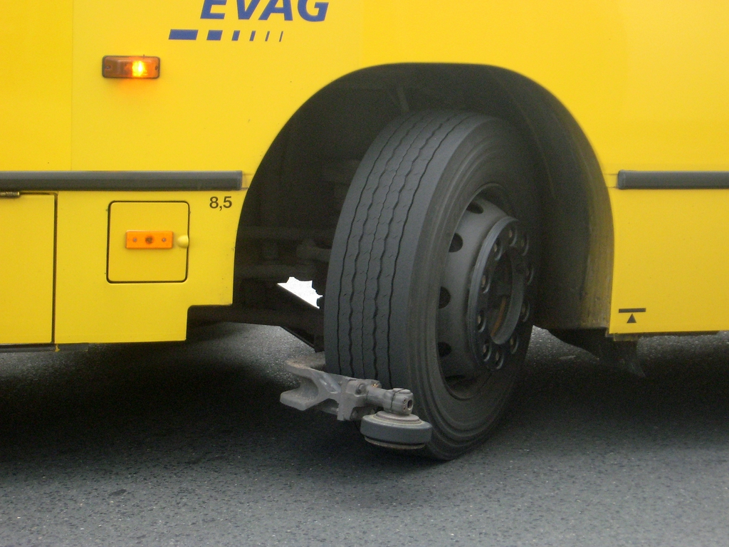 Die Spurrolle eines Spurbusses vom Typ O405N(2) der EVAG.